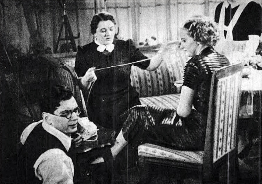 Werkfotó Az én lányom nem olyan című filmből. Bal oldalon a rendező Vajda László látható, középen Gombaszögi Ella, jobbra Tolnay Klári